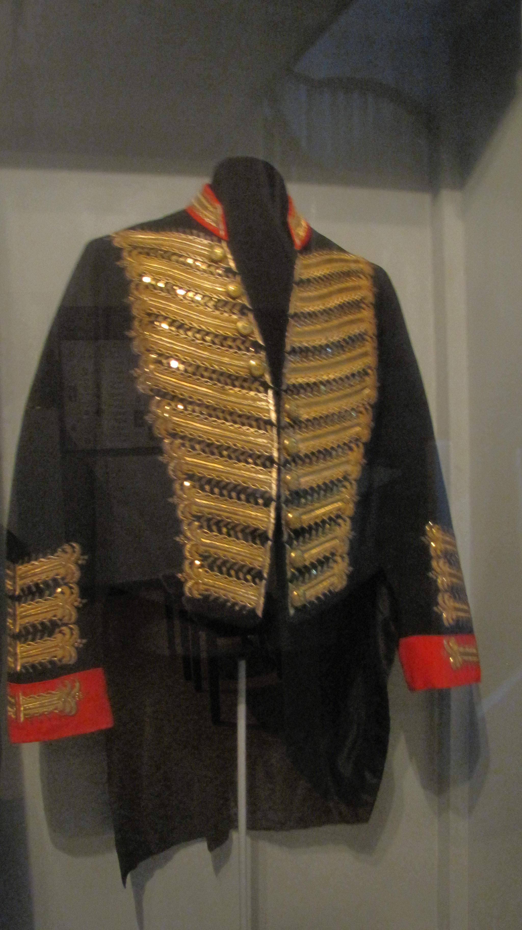 Historische Landtagsuniform eines Mitglieds der Mecklenburgischen Ritterschaft im Volkskundemuseum Schönberg